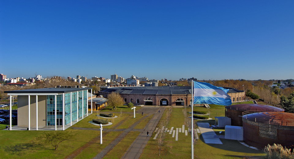 Foto panorámica del Campus Miguelete de la Universidad Nacional de General San Martín.